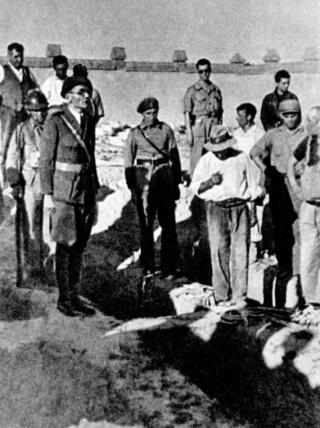 Srpskohrvatski / српскохрватски: Momenat sa sahrane Blagoja Parovića. Govori Karlo Mrazović